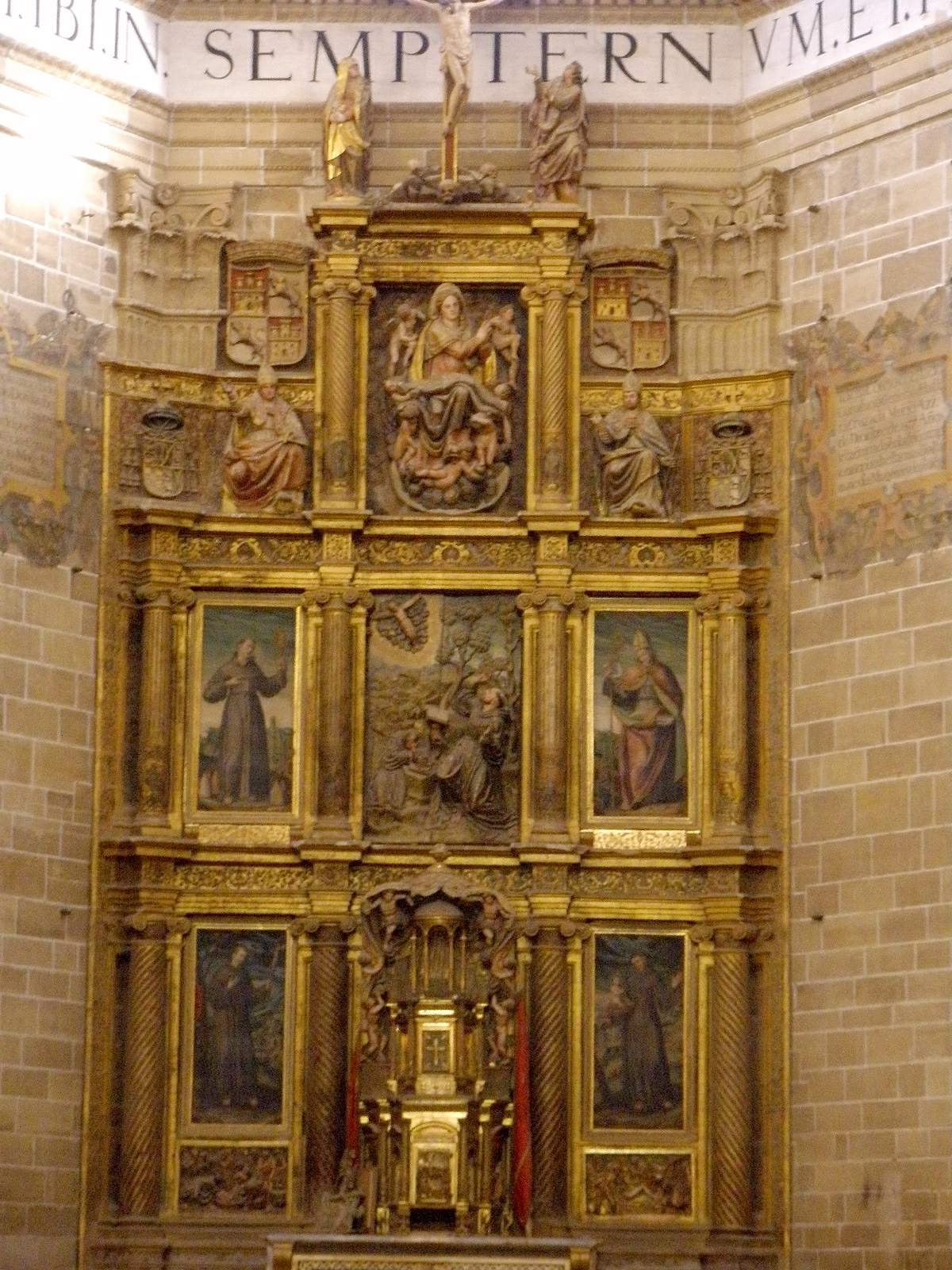 Retablo mayor de la Iglesia del antiguo Convento de San Francisco en Santo Domingo de la Calzada (La Rioja), hoy, Parador de Turismo Bernardo de Fresneda